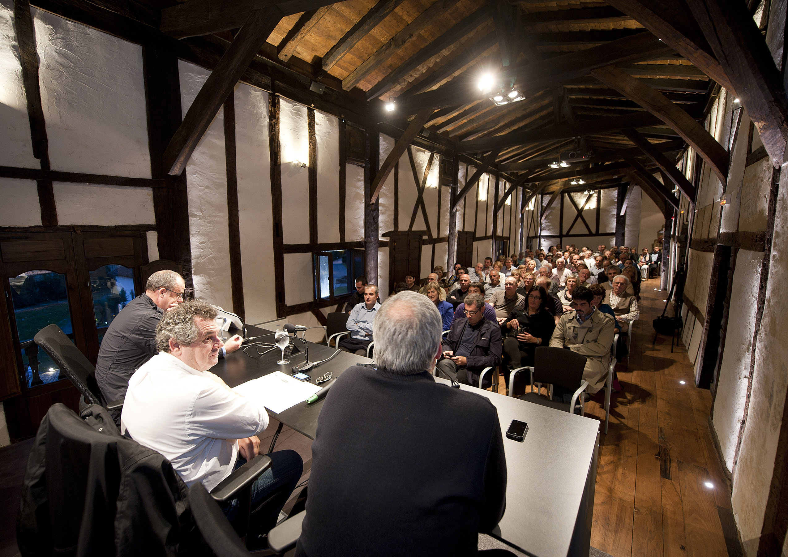 Convergència Democràtica de Catalunyako Kanpo Harremanetarako arduradun den Victor Terradellasek eta EAJ-PNVko Joseba Egibarrek Beasaingo Igartza Jauregian "Catalunya eta Euskadi bi nazio etorkizunaren bila" lelopean emandako hitzaldiaren irudiak (2012).